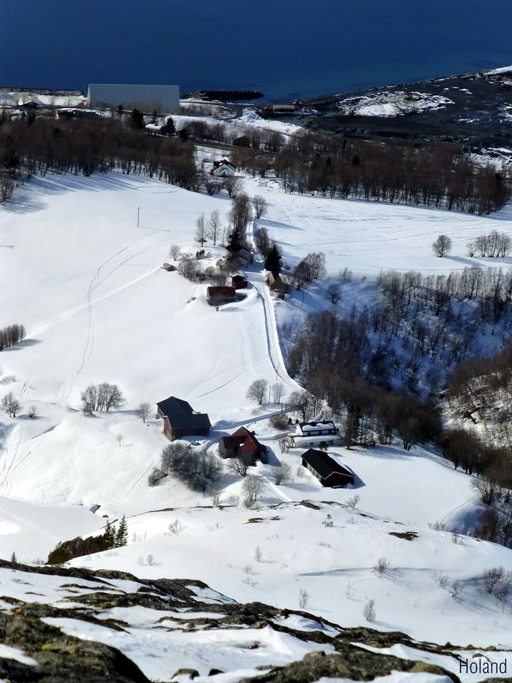 Holandsgårdene sett fra fjellet over på vinteren.